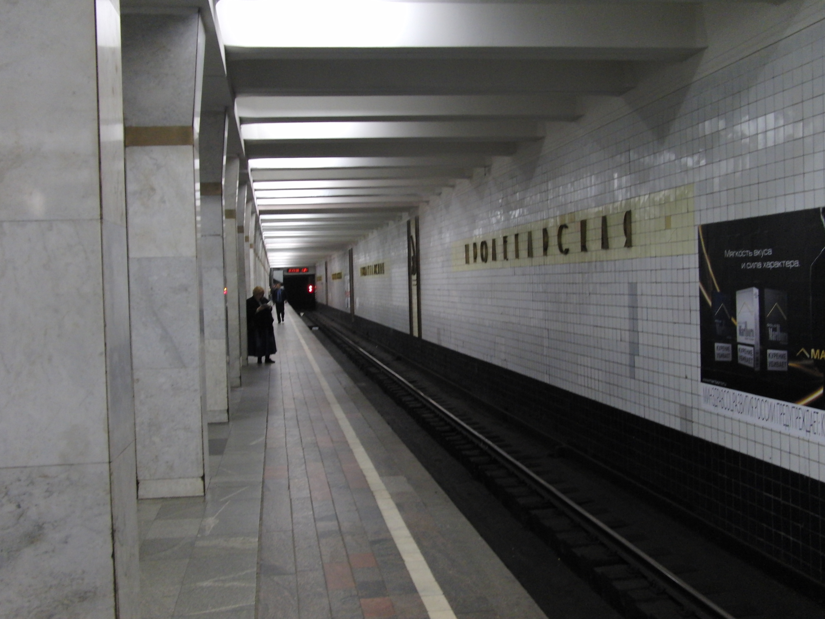 Proletarskaya (Пролетарская)